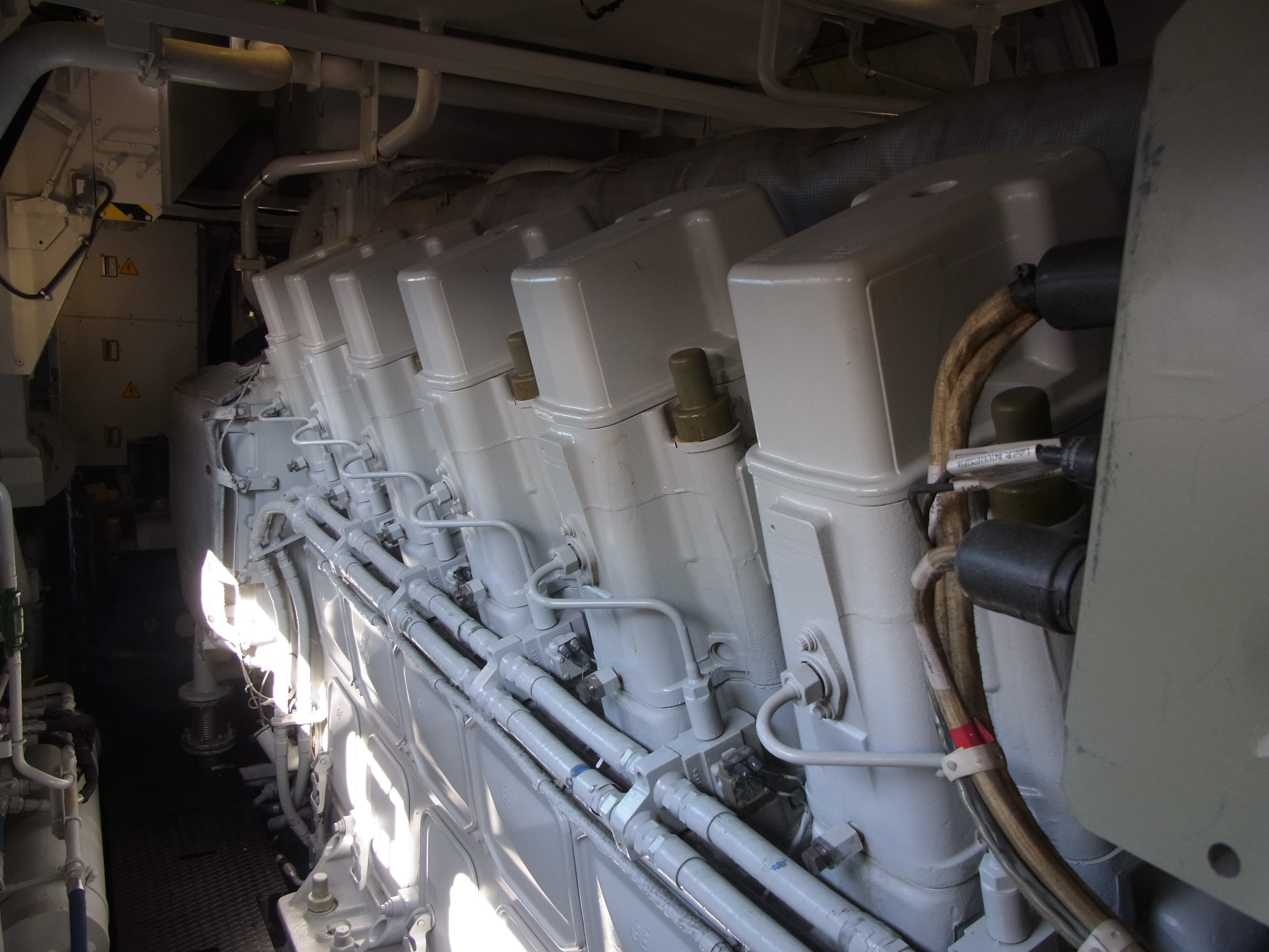 Дизельный двигатель GEVO V12 в кабине тепловоза 3ТЭ25К2М-0001